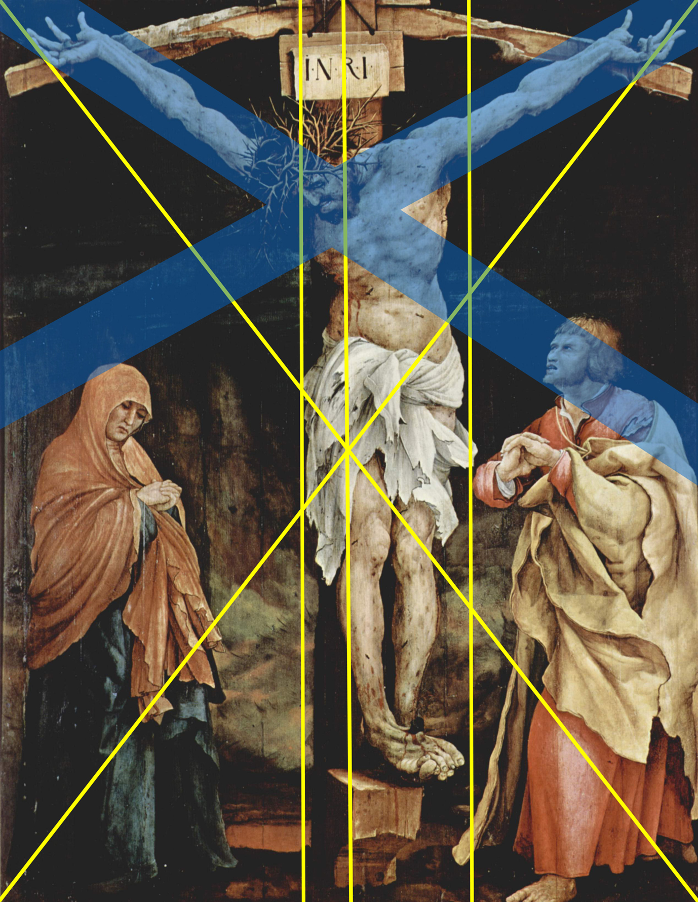 Matthias Grünewald: Kreuzigung, Tauberbischofsheimer Altar. Formaler Bildaufbau, Bilddiagonalen und Achsen